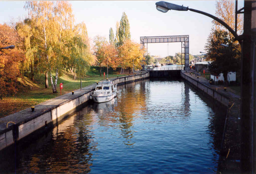 Schleuse von Mukrena (eigene Arbeit)